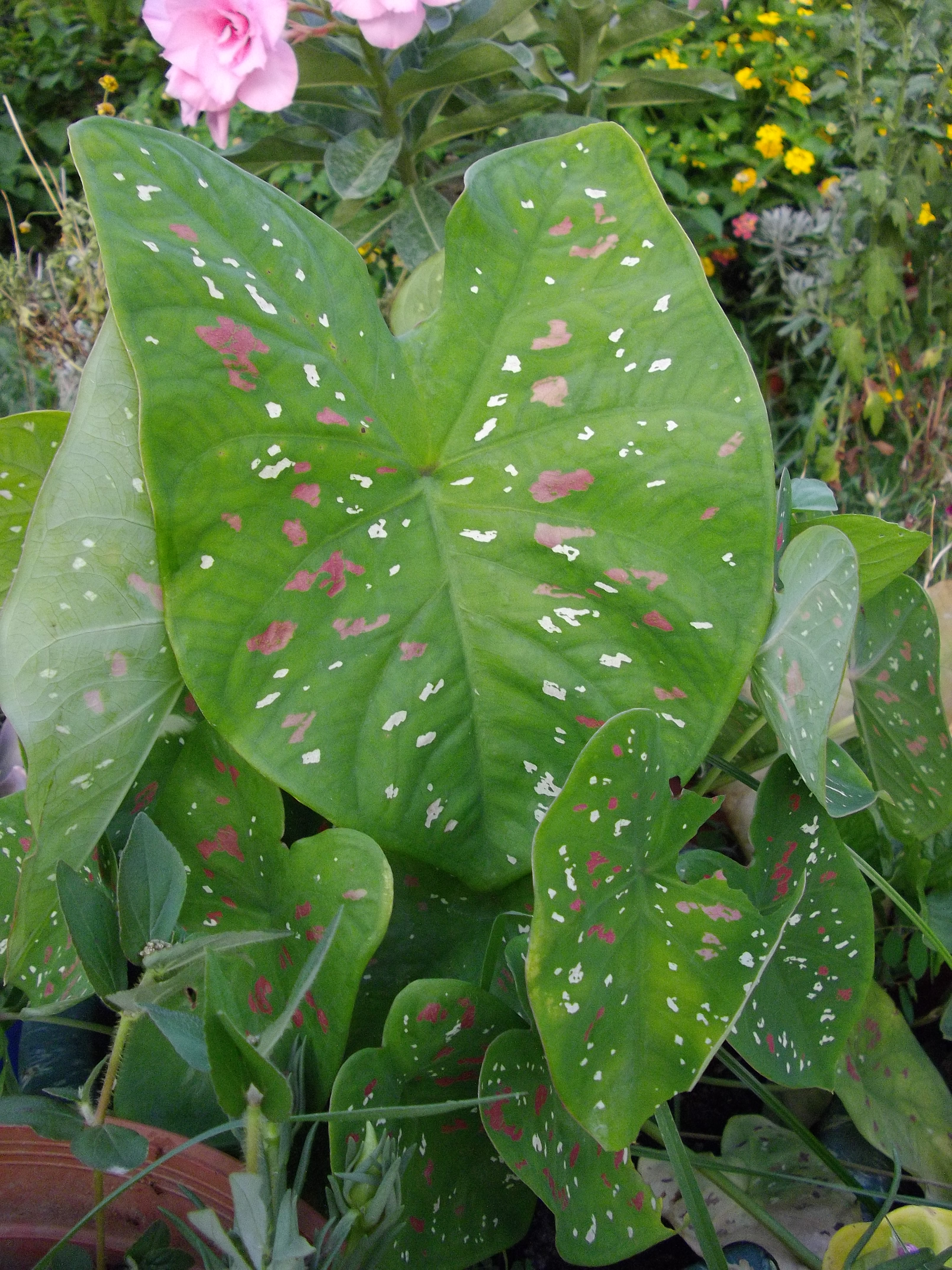 漆班彩葉芋, picture taken by +0